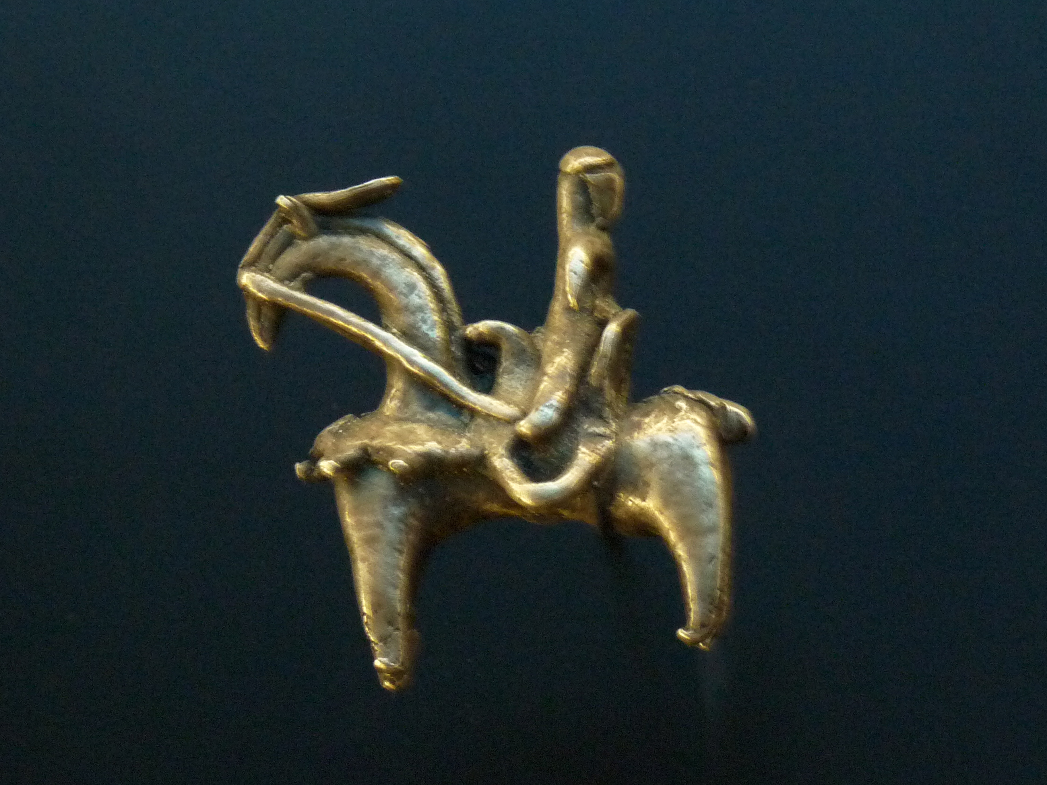 Bijou : figure de cavalier, population Kotoko, Tchad. Musée du quai Branly.